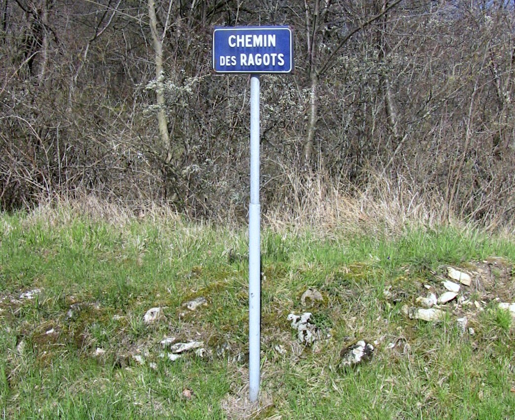 Plaque du chemin des Ragots de Besançon. Catégorie:Image de Besançon